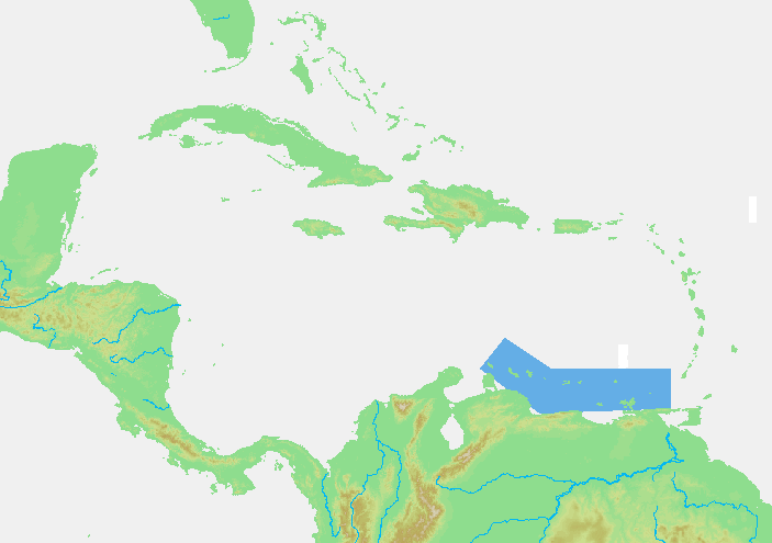 Caribbean - Benedenwindse eilanden.PNG